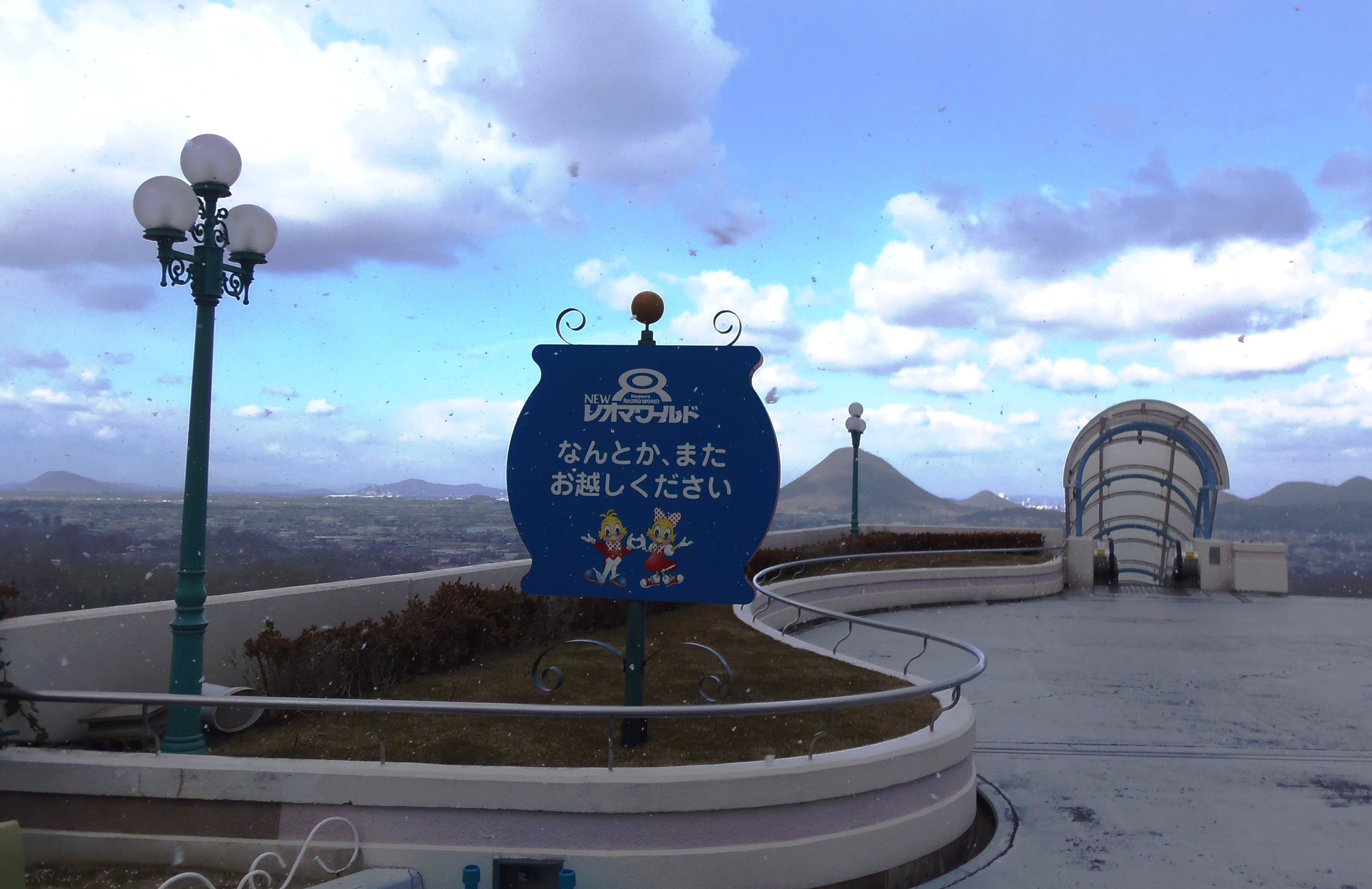 香川県丸亀市綾歌町にあるNEWレオマワールドのゲート外エスカレーター前の看板